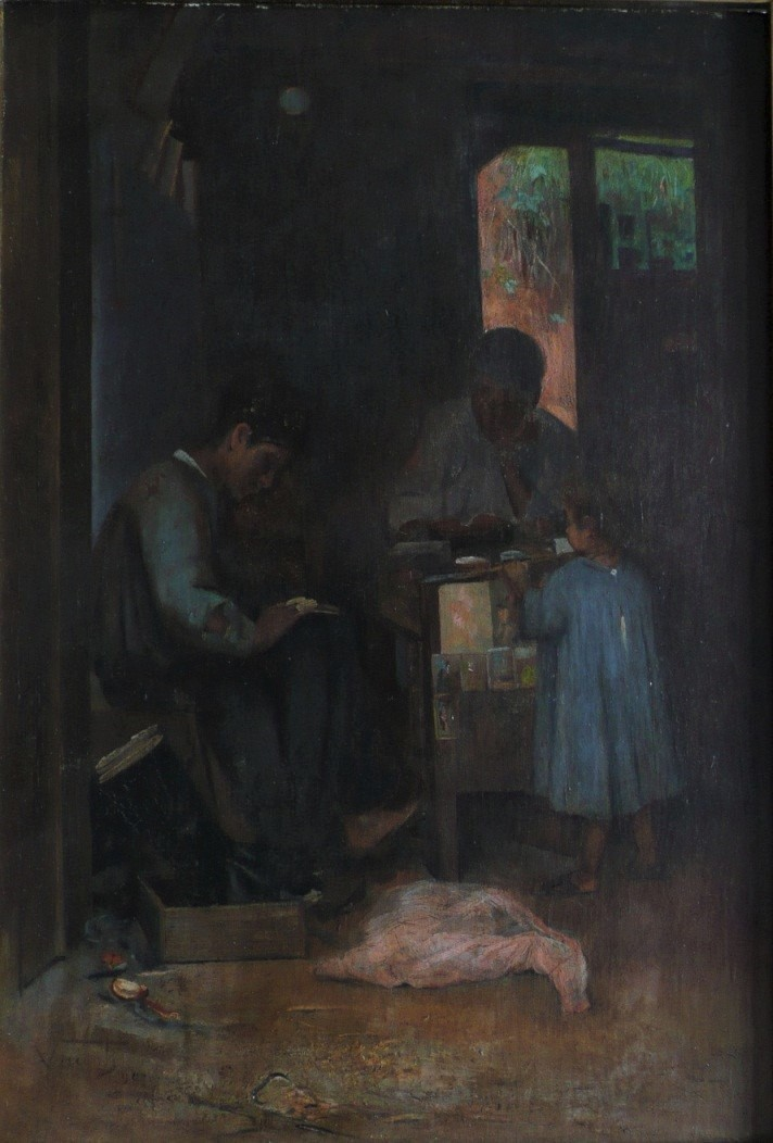 Obra do Projeto Eliseu Visconti